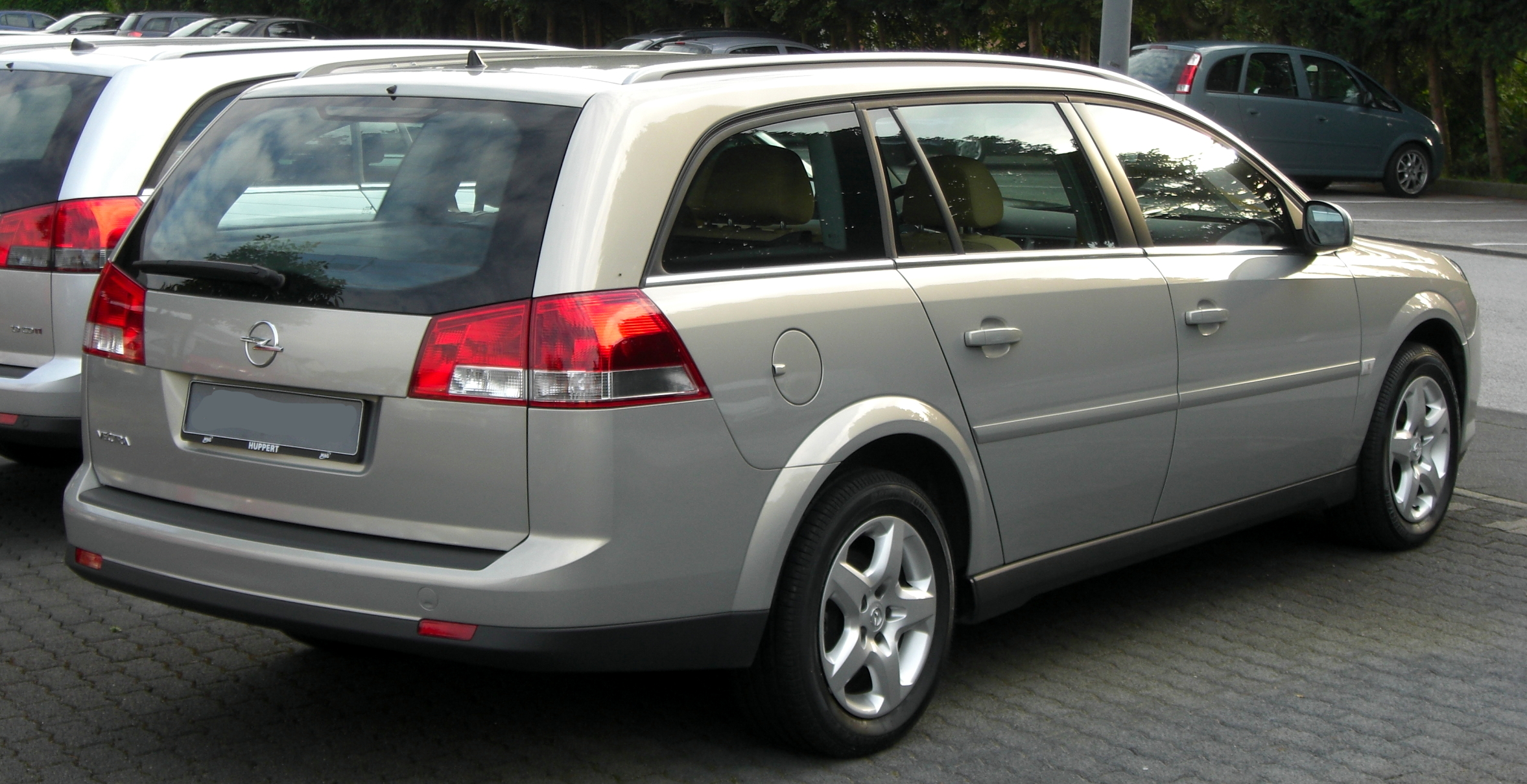 Opel Vectra C Caravan